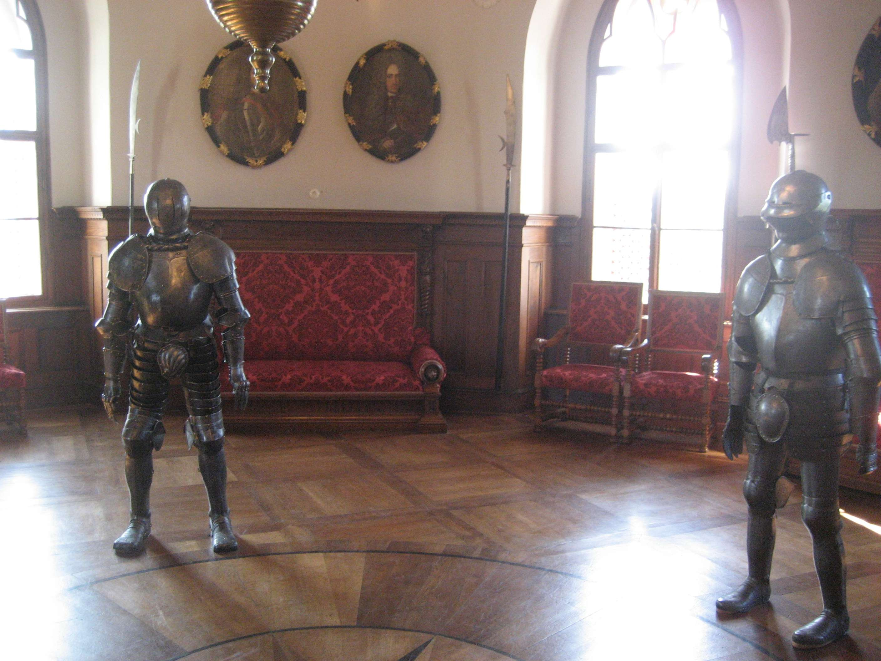 Rittersaal, Schloss Trakoscan, Kroatien